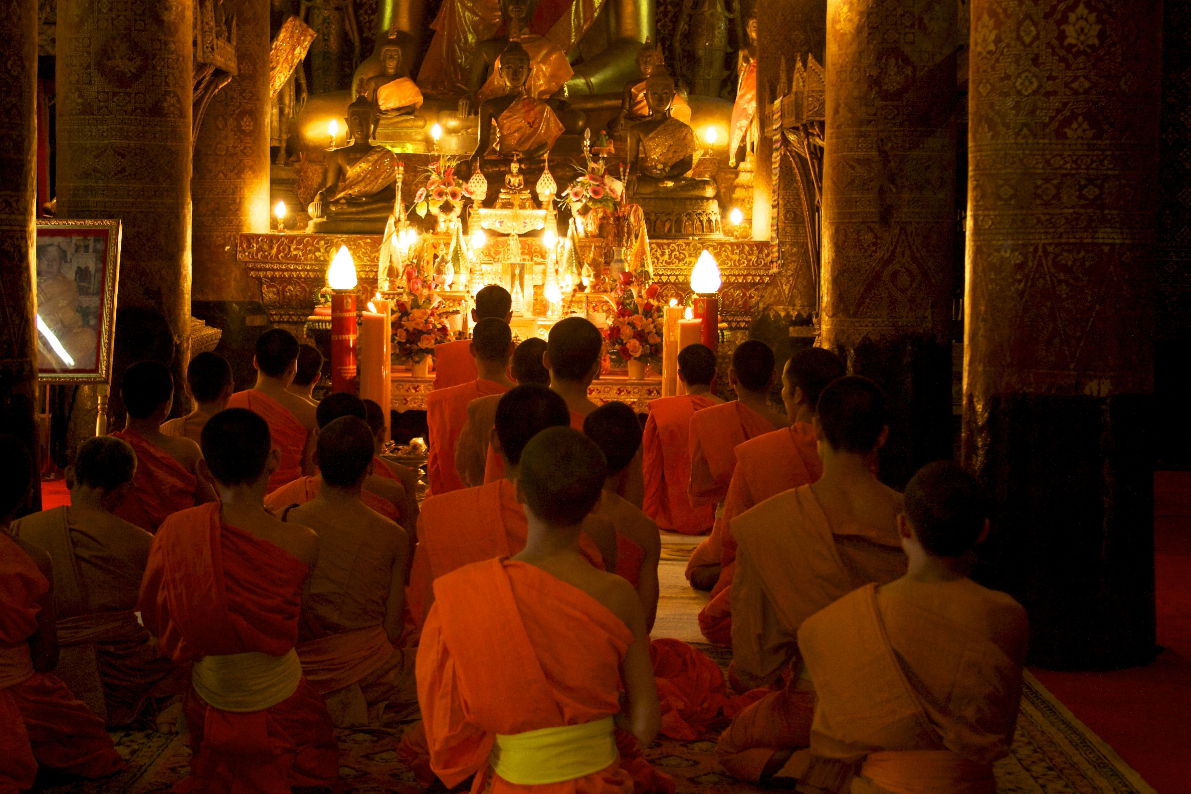 Laos - Luang Prabang 100 - evening prayer at Wat Xieng Thong